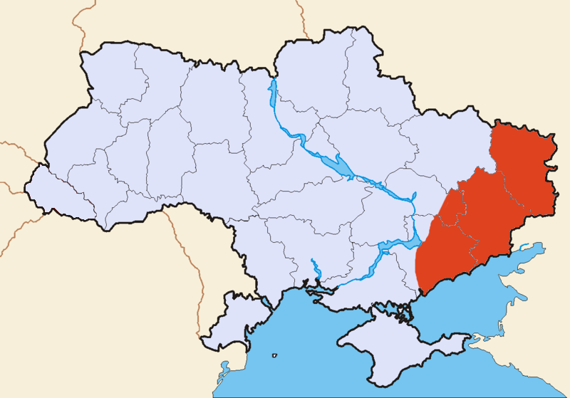 Position de la Méotide en Ukraine